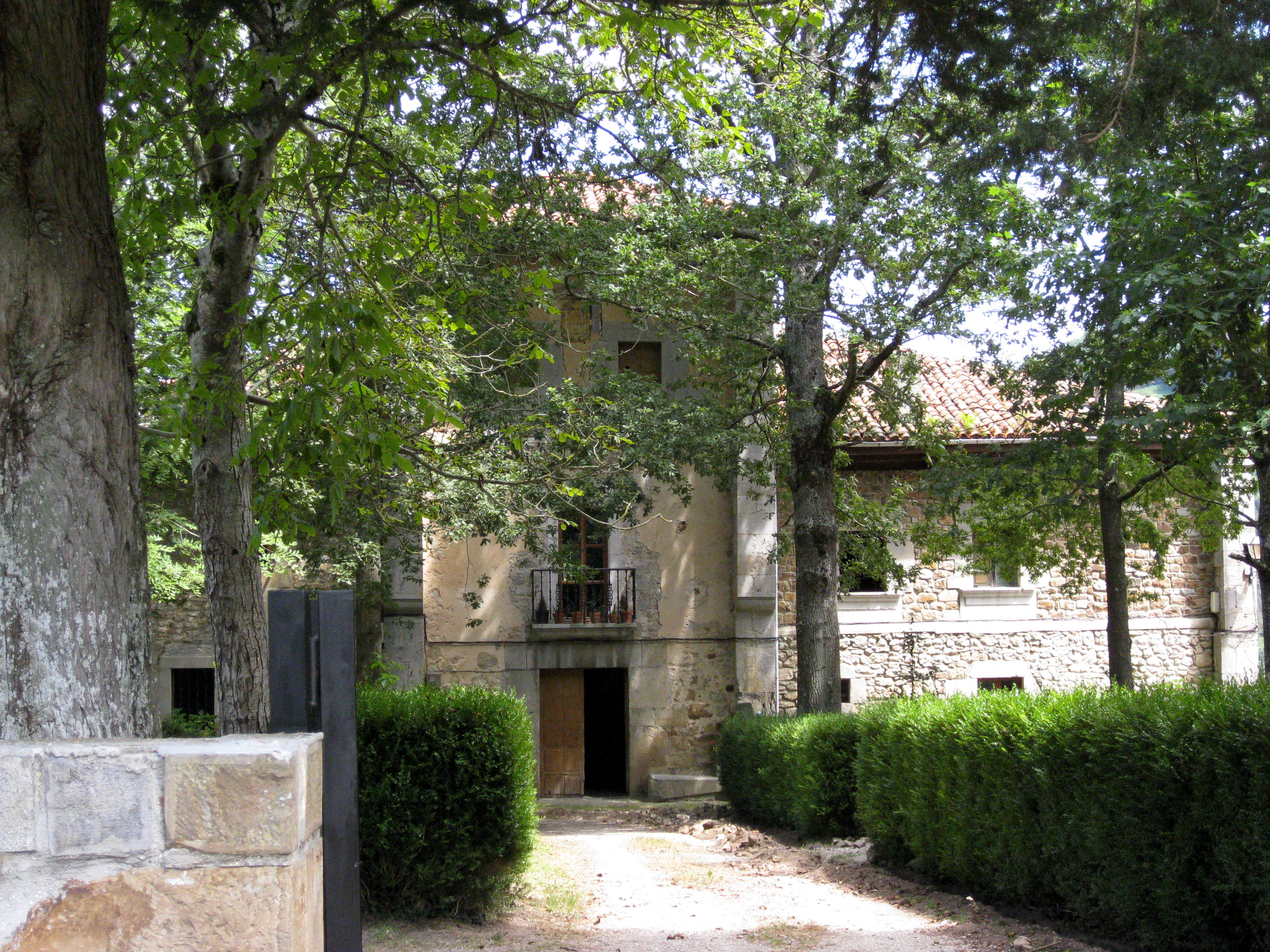 Palacio de Díaz Iguanzo, Berodia, concejo de Cabrales, Asturias